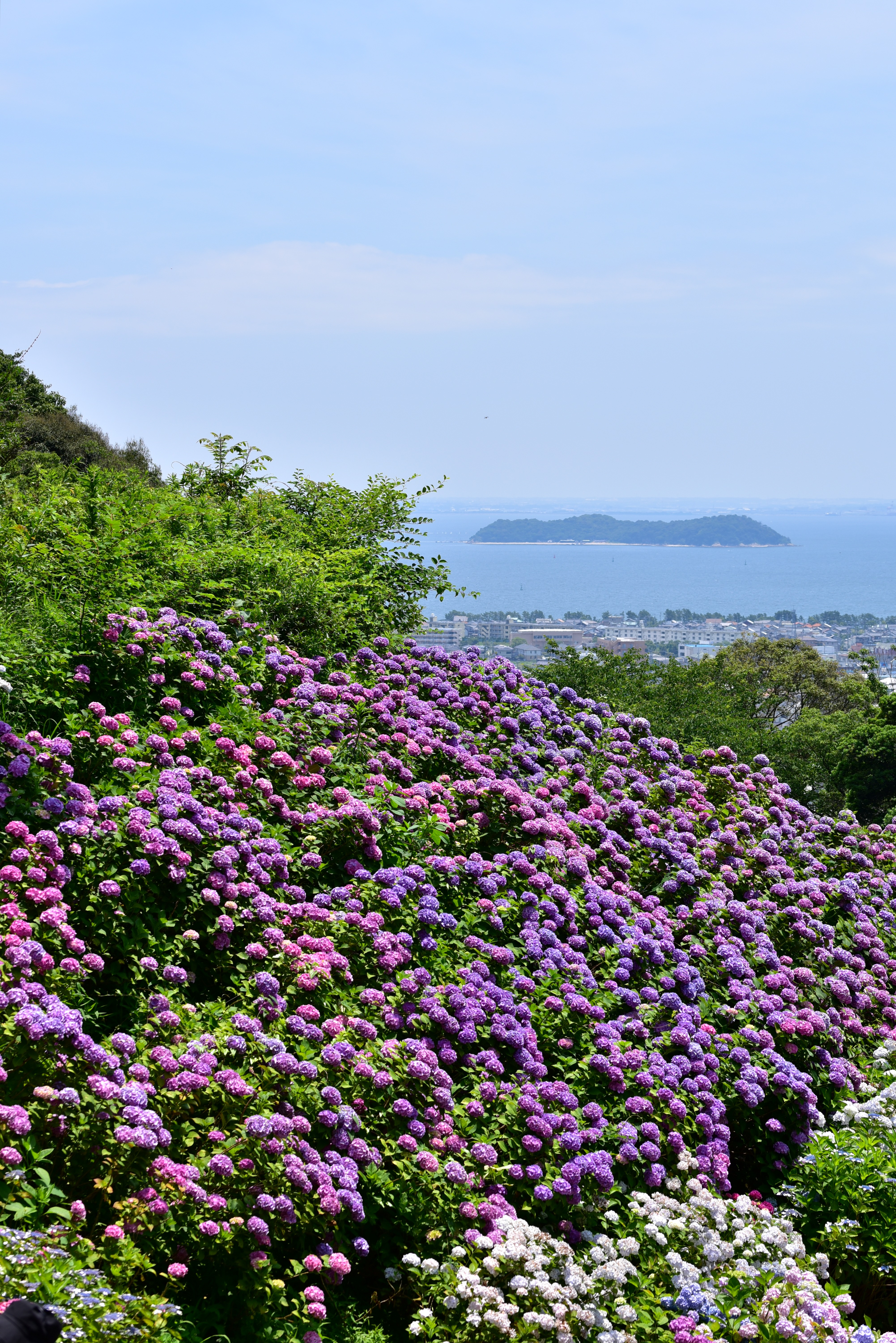 形原温泉あじさいの里 Nikon D750